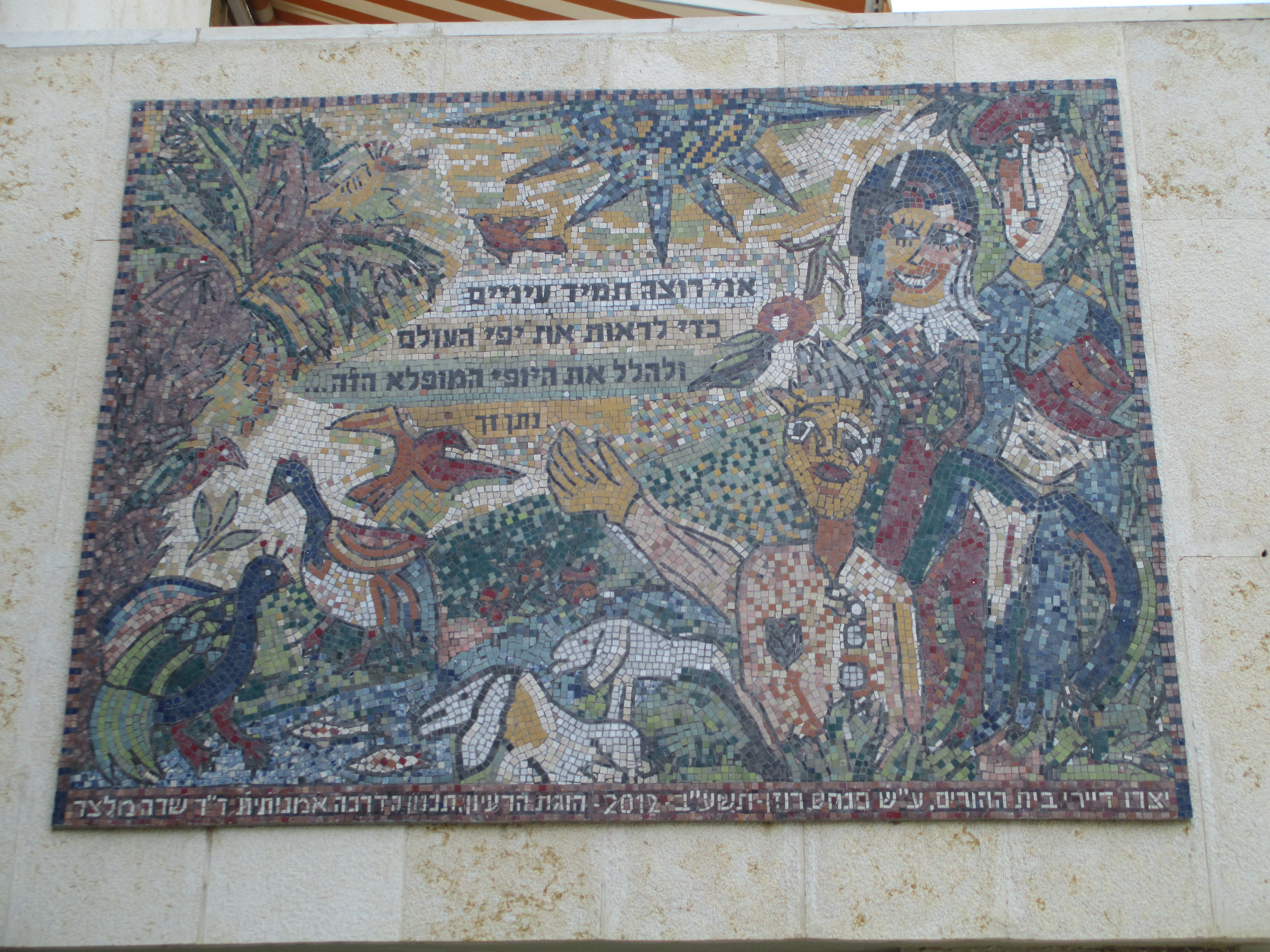 פסיפס בכניסה לבית האבות ע"ש פנחס רוזן ברמת חן, רמת גן